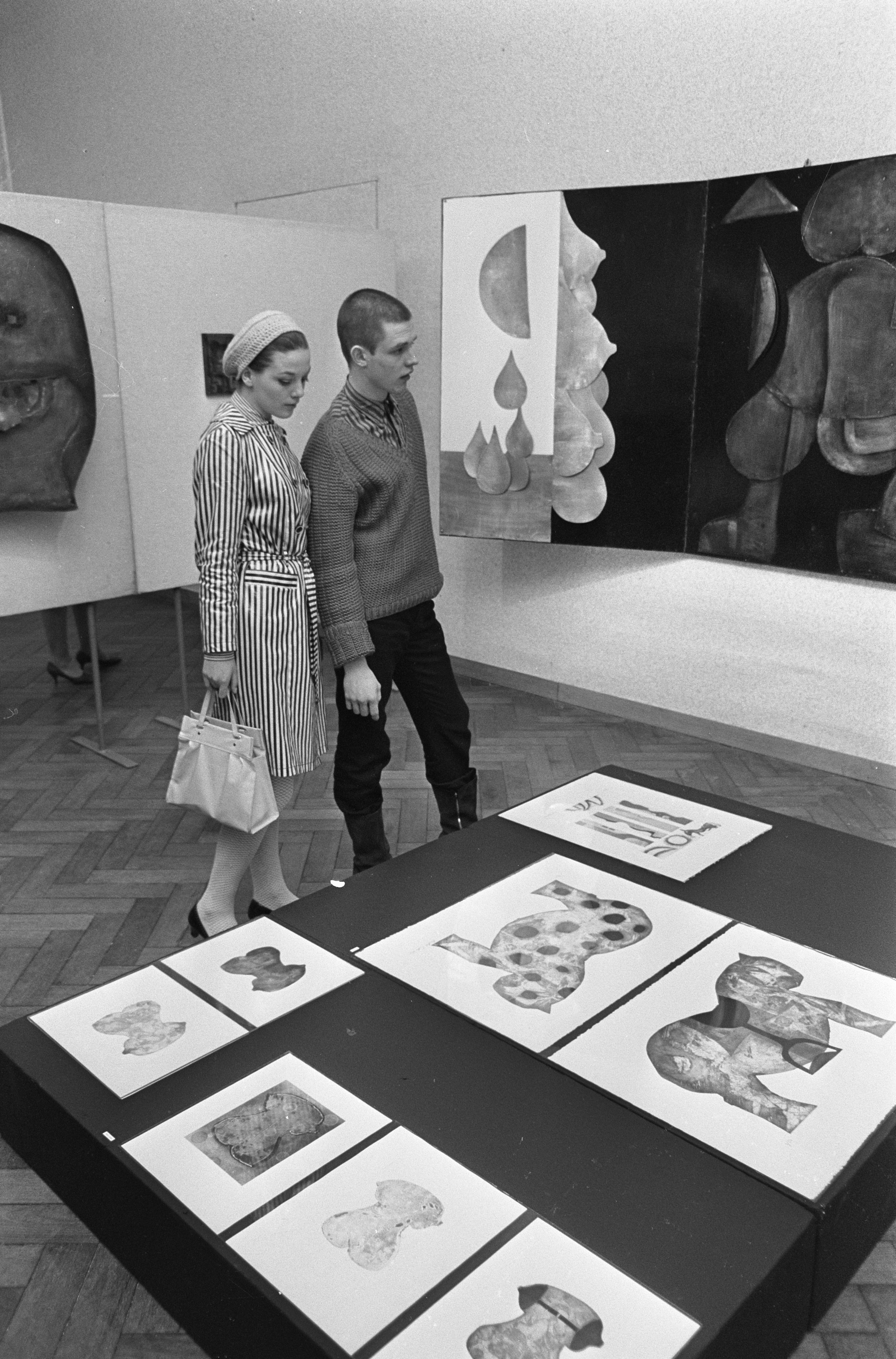 Collectie / Archief : Fotocollectie Anefo Reportage / Serie : [ onbekend ] Beschrijving : Expositie van Andre Francois in Stedelijk Museum Datum : 23 februari 1967 Trefwoorden : Exposities, musea Fotograaf : Nijs, Jac. de / Anefo Auteursrechthebbende : Nationaal Archief Materiaalsoort : Negatief (zwart/wit) Nummer archiefinventaris : bekijk toegang 2.24.01.05 Bestanddeelnummer : 920-1055